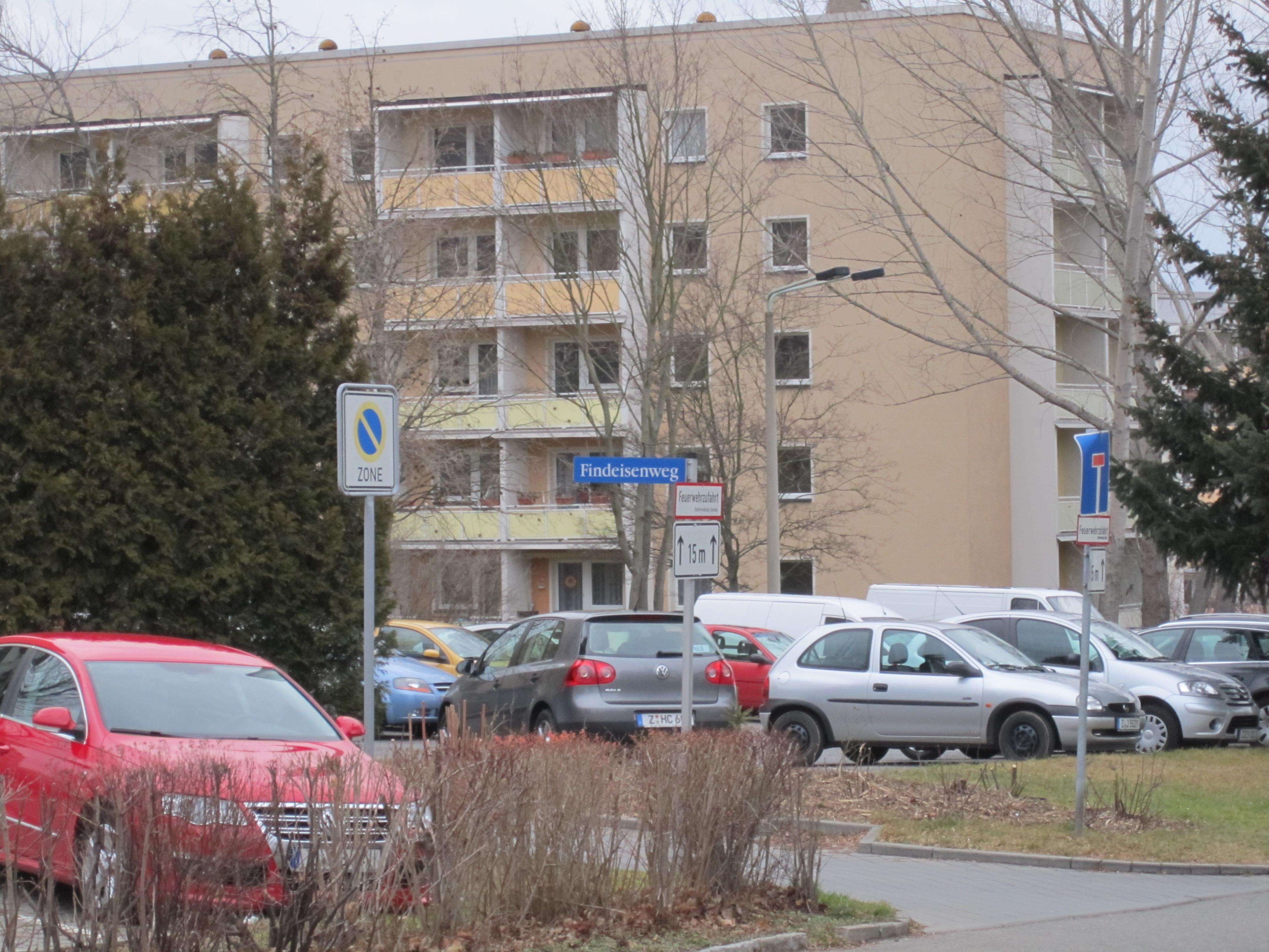 Neuplanitz, Findeisenweg